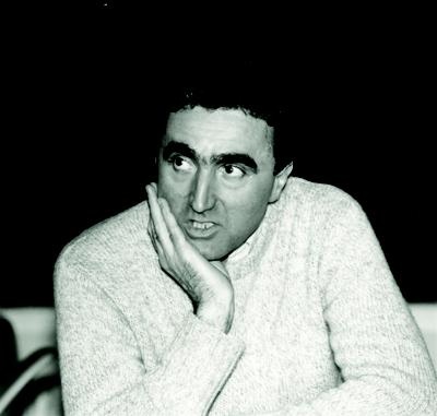 Foto di Louis Billera